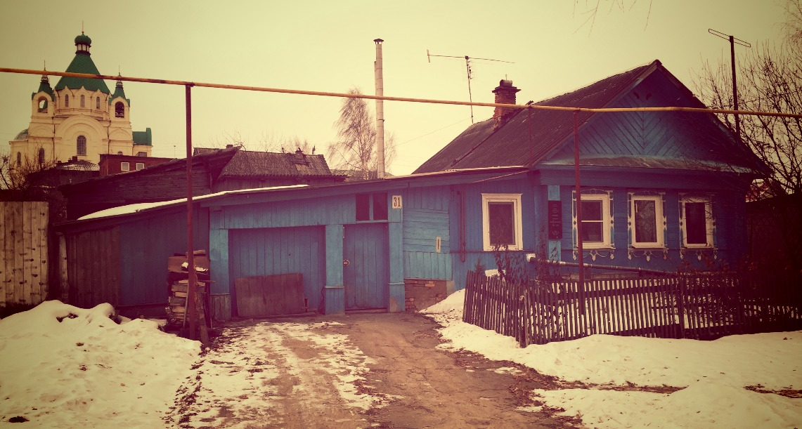 Дом, в котором жил Герой Советского Союза В.А.Вересков: улица Верескова, 31, Нижний Тагил, Свердловская область